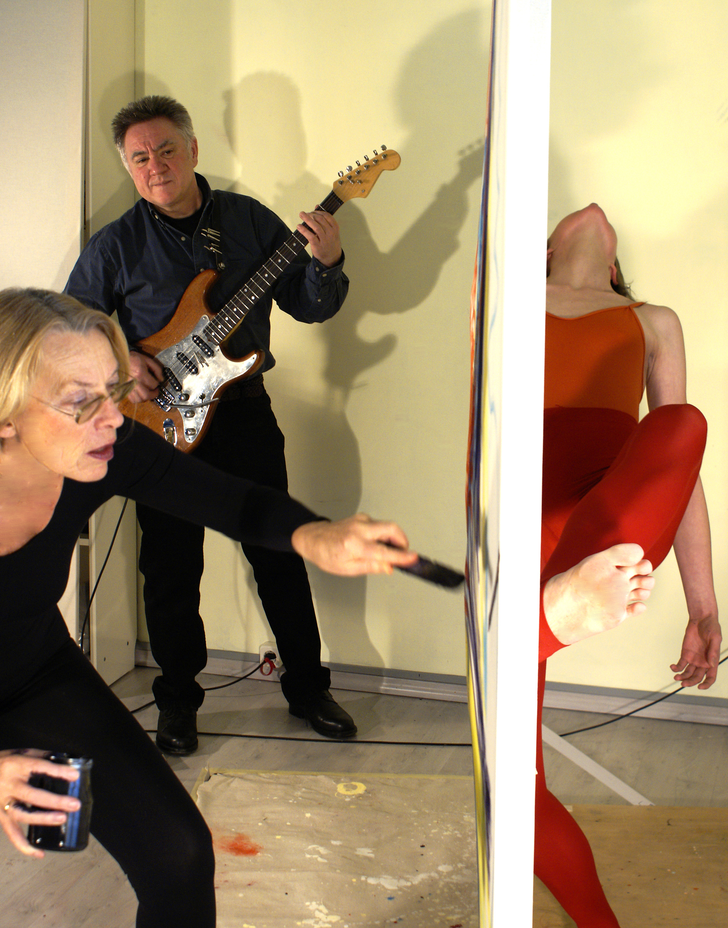 Malerei als Ereignis im Atelier von Barbara Heinisch (Konzept und Malerei), Meike Hild (Tanz) und Frank Rühl (Gitarre)